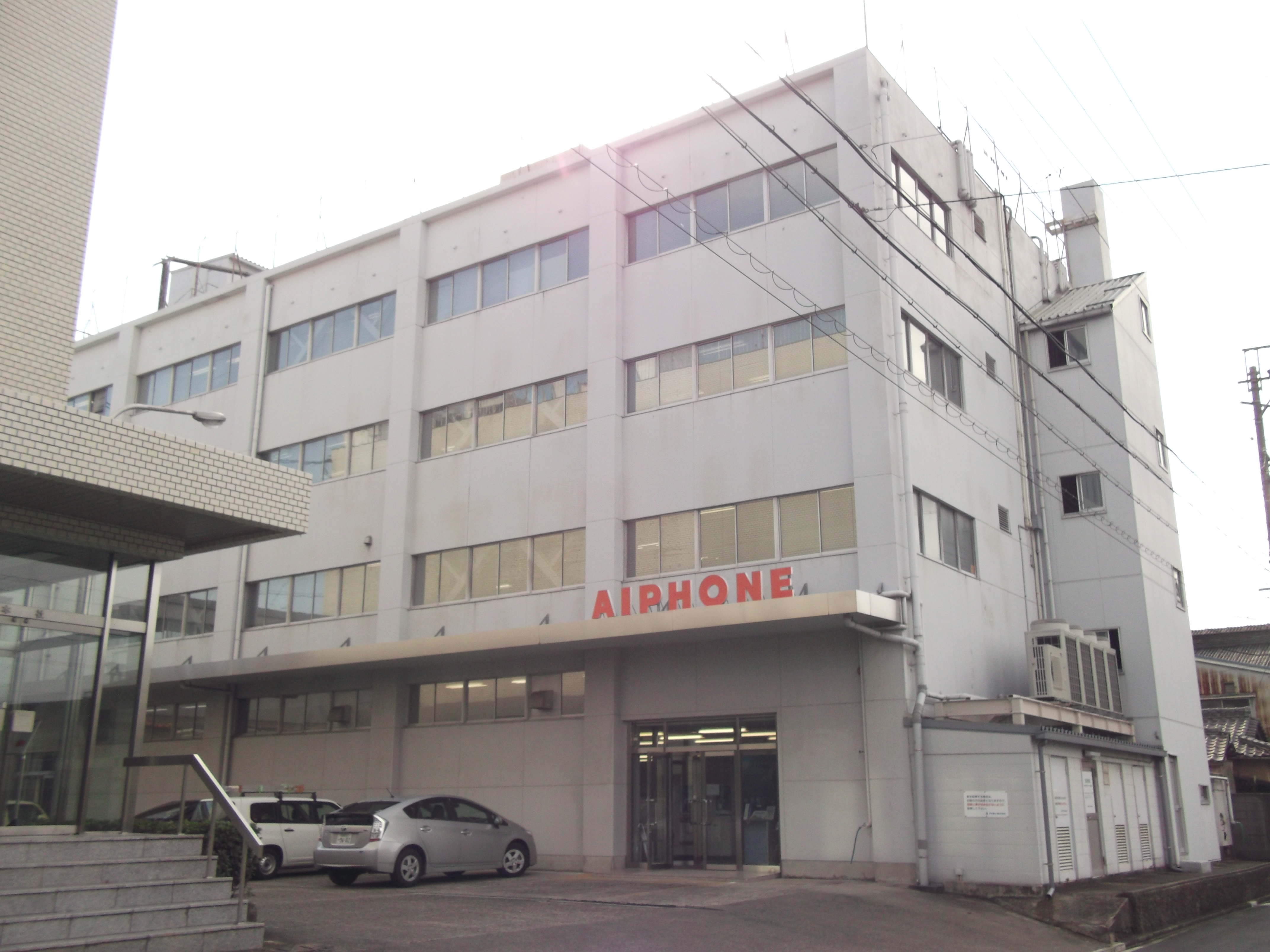 名古屋市熱田区神野町のアイホン本社2号館を北側公道東側より撮影